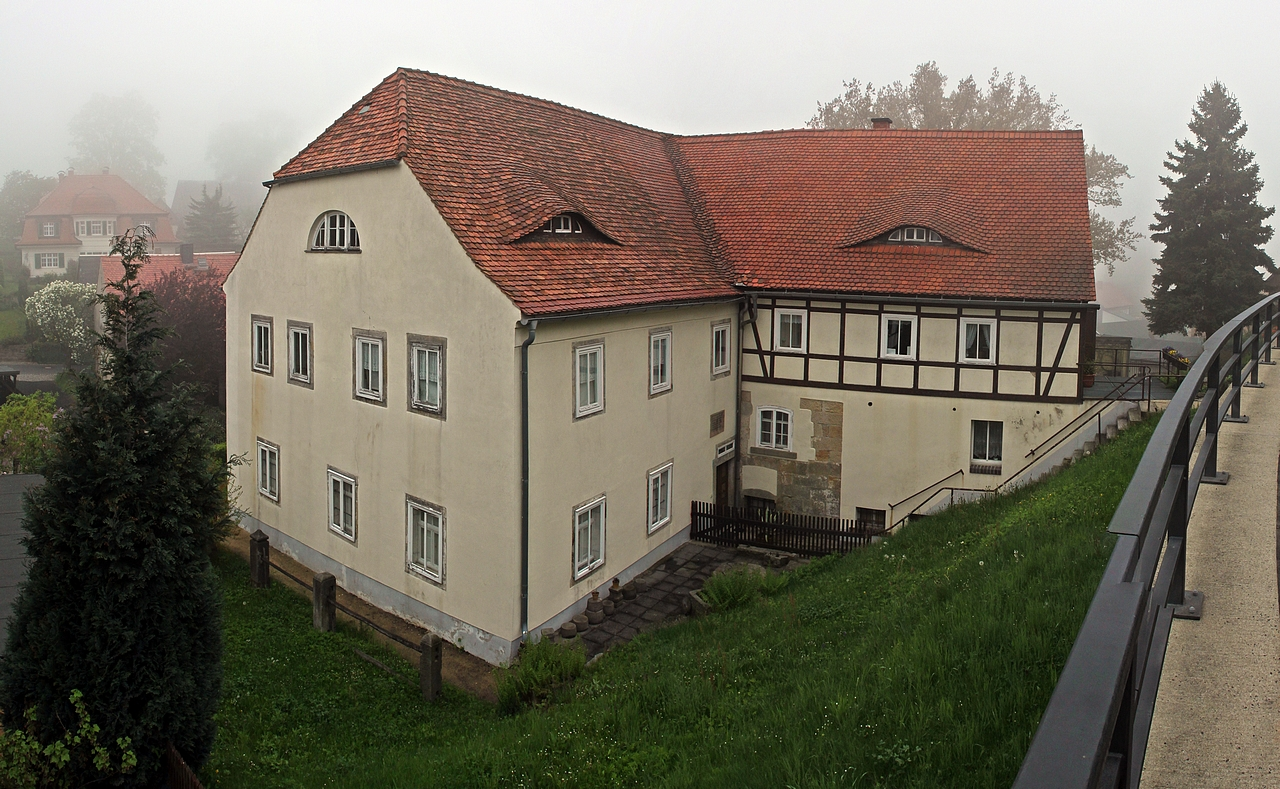 Waltersdorf (Großschönau): Blick auf die Mittelmühle. Die Mühle entstand wahrscheinlich um 1400. Sie wurde 1614/15 als Steinbau neu errichtet und arbeitete später als Getreidemühle, Bäckerei, Schrotmühle und Sägewerk. Der Betrieb wurde 1955 eingestellt, ein Jahr später wurde hier das Heimatmuseum (heute Volkskunde- und Mühlenmuseum) eingerichtet. (Dorfstraße 89, Denkmal-Nr. 09270820)